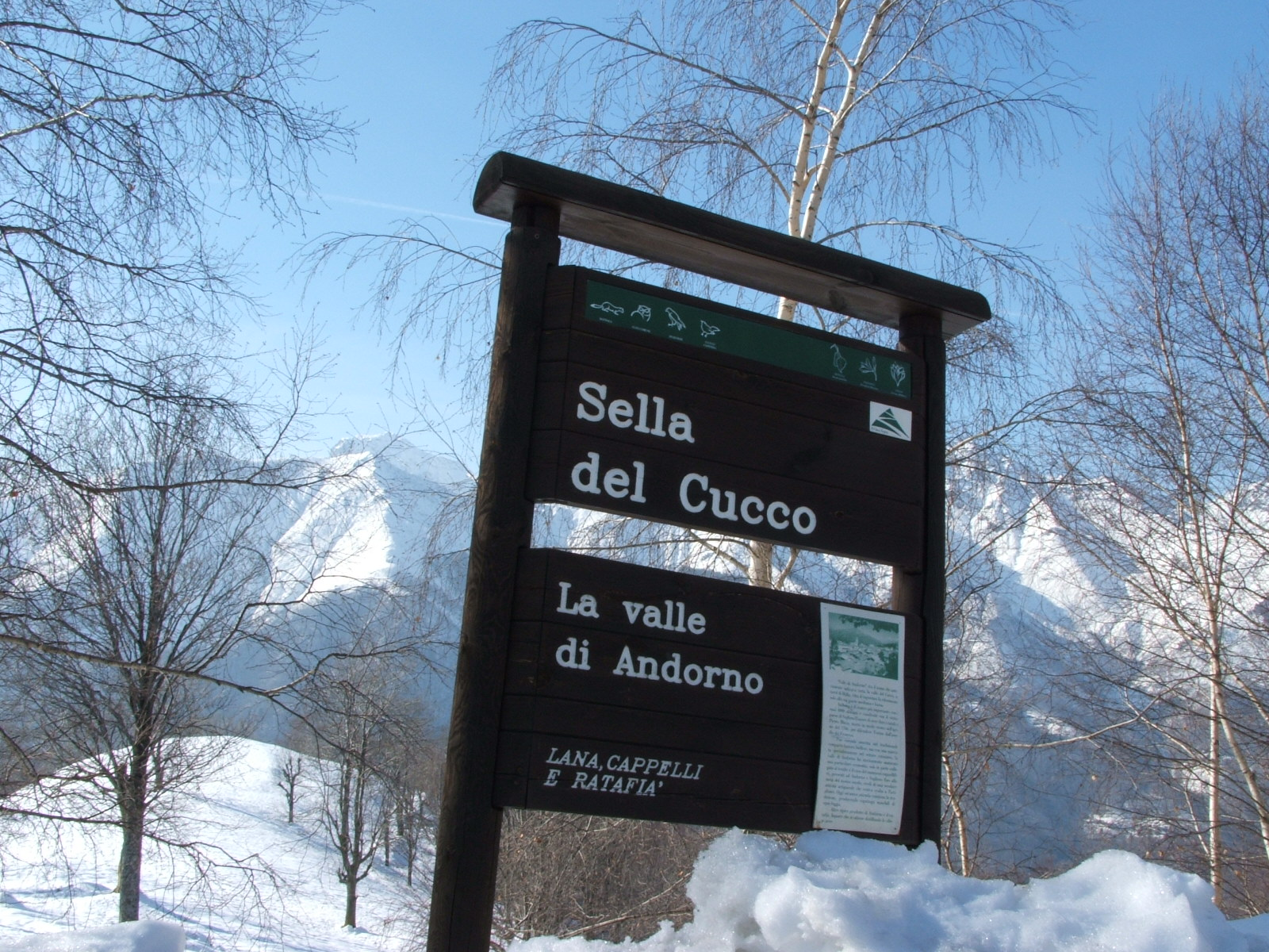 Valle Sessera, zona di Bocchetto Séssera e Bielmonte, Biella (Piemonte, Italia) in inverno